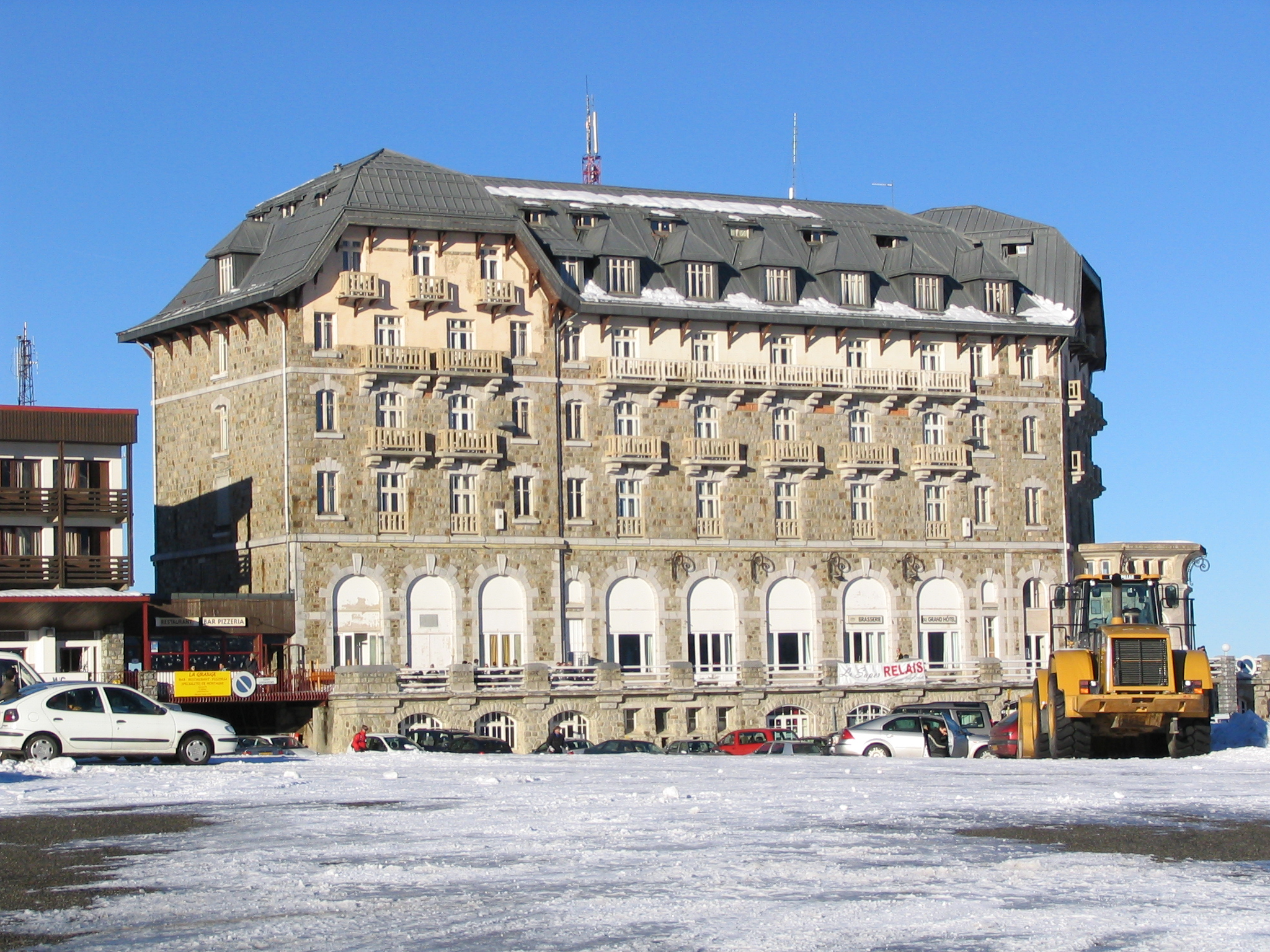 Grand hôtel de Superbagnères (Haute-Garonne, France).